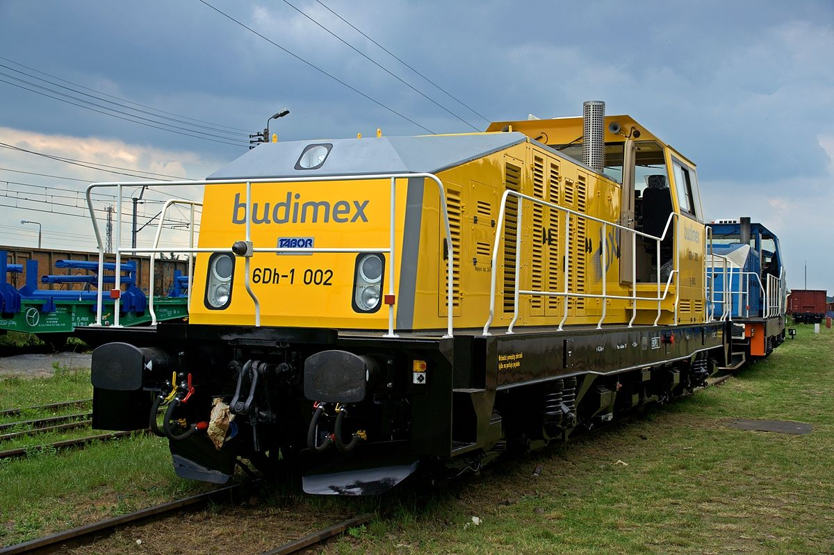 Zmodernizowany spalinowóz 6Dh-1 002 należący do Budimexu stoi na terenie Taboru Dębica podczas prezentacji w ramach dnia otwartego tego przedsiębiorstwa.